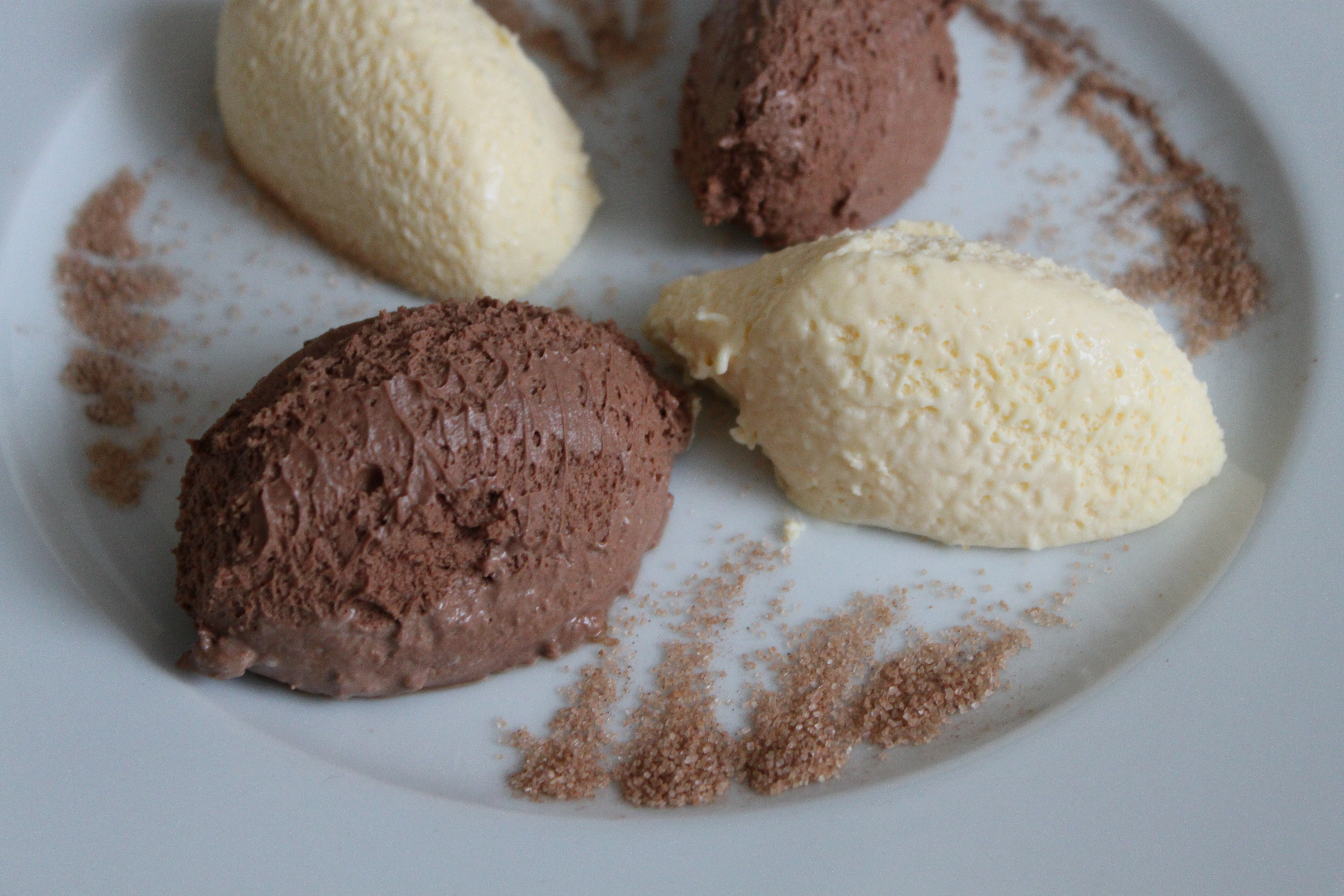 Mousse au Chocolate; und weiße Mpusse